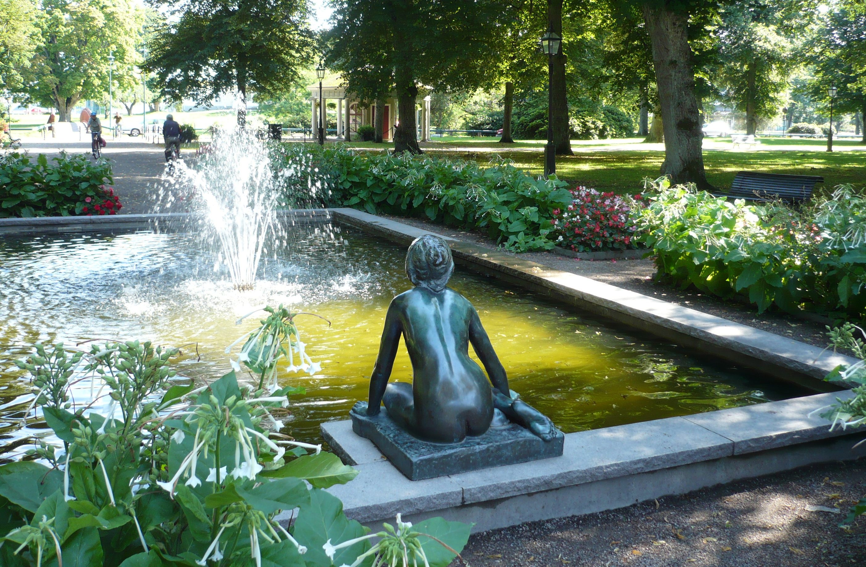 "Grodan" i brons från 1917 med egen damm i Ronneby Brunnspark. Grodan (franska: La Grenouille) är en skulptur av en sittande kvinnofigur. Skissen i gips utfördes i Paris 1887 av Per Hasselberg.